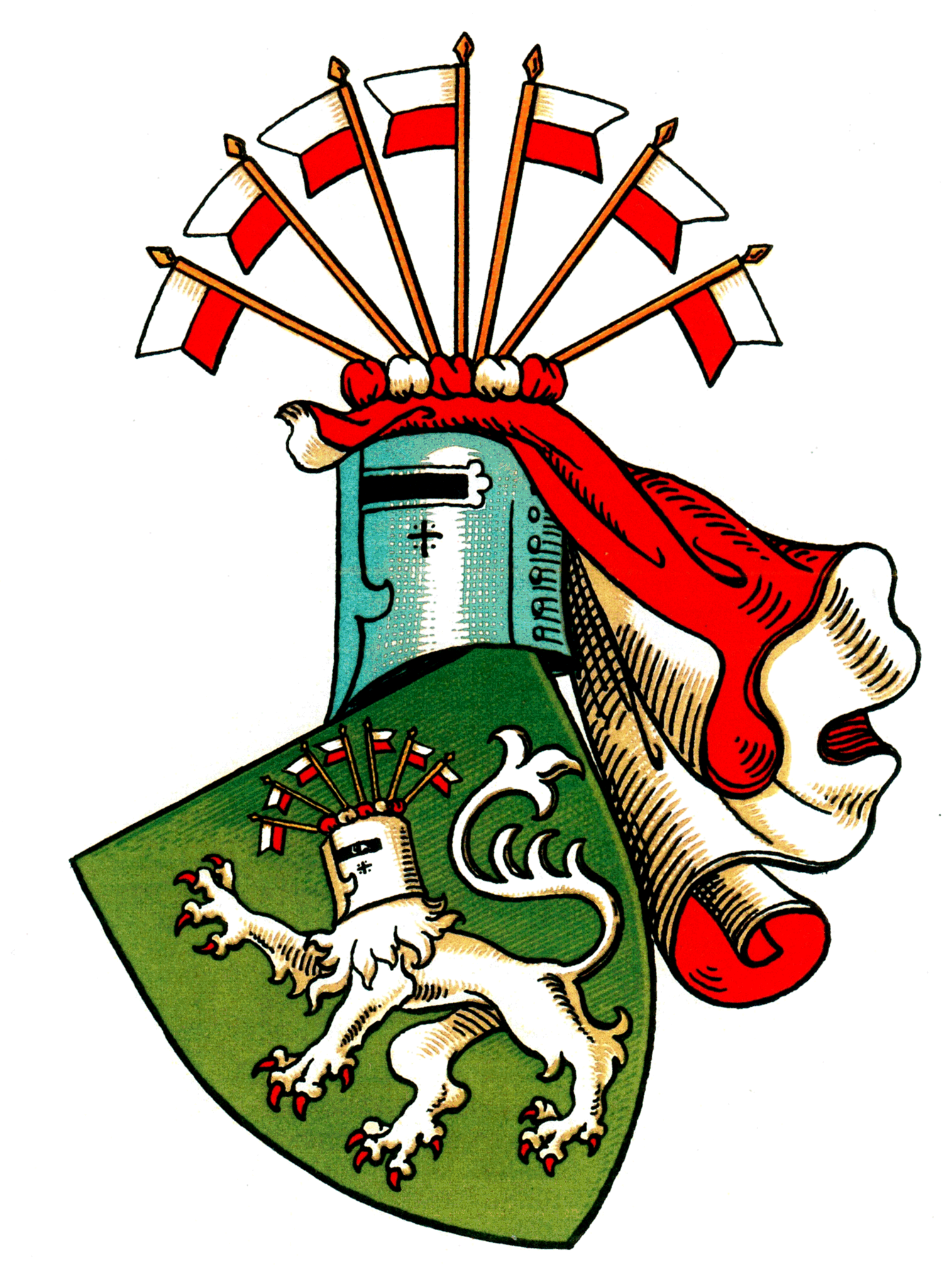 Wappen der von Bültzingslöwen (Thüringer Uradel)